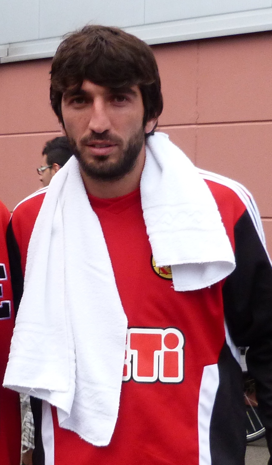 Burhan